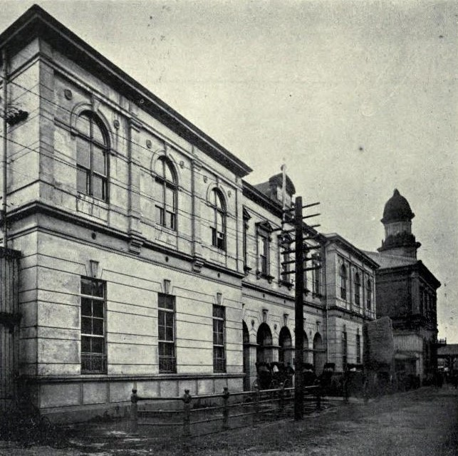 大阪商船 明治時代